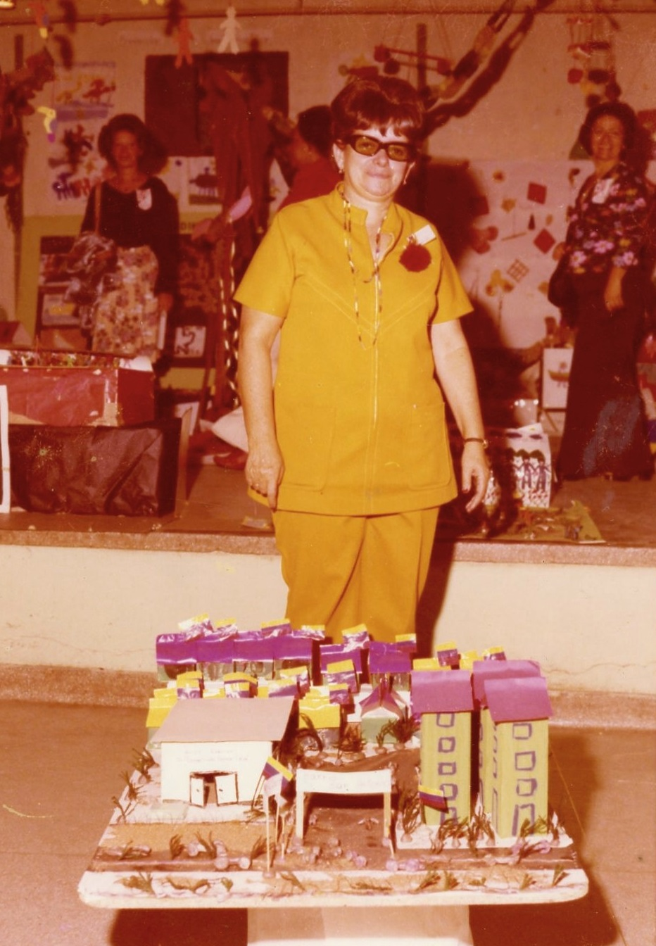 Dilia Elena Díaz Cisneros de Ramos, educadora venezolana. Fundadora del Grupo Escolar Caracciolo Parra León. El Valle, Caracas.